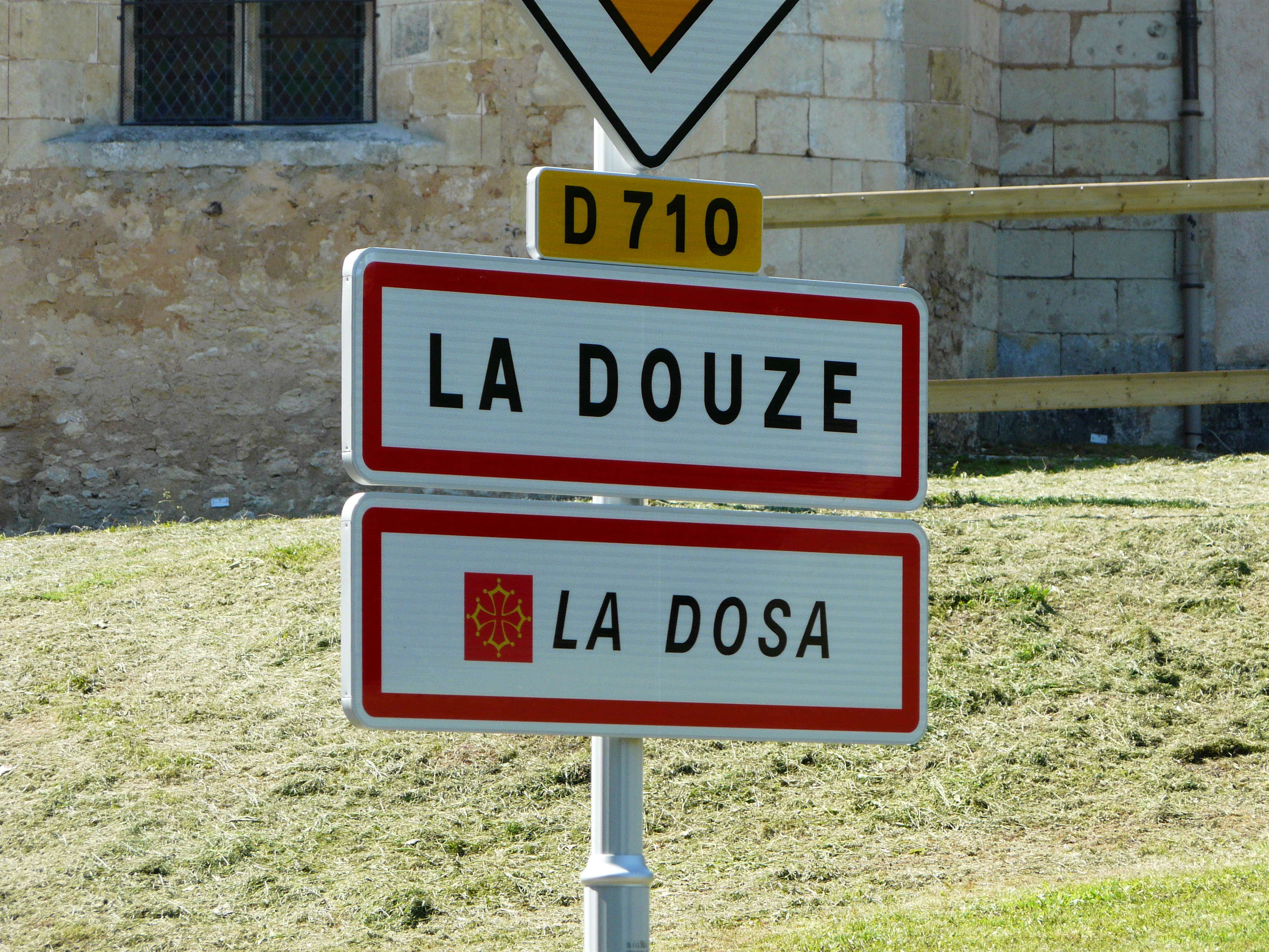 Panneau en français et en occitan, La Douze, Dordogne, France.